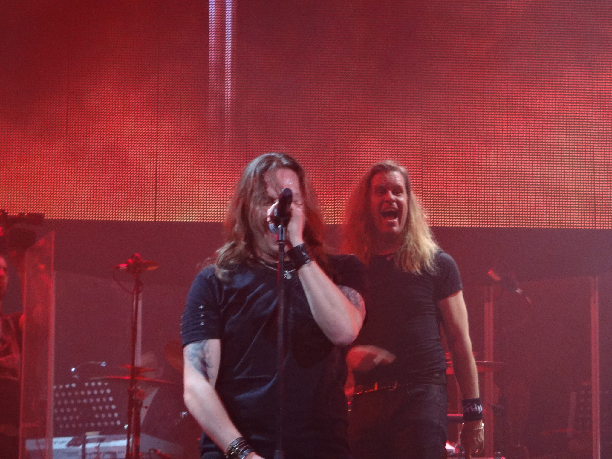 Михаил Житняков и Ульф Ваденбрандт